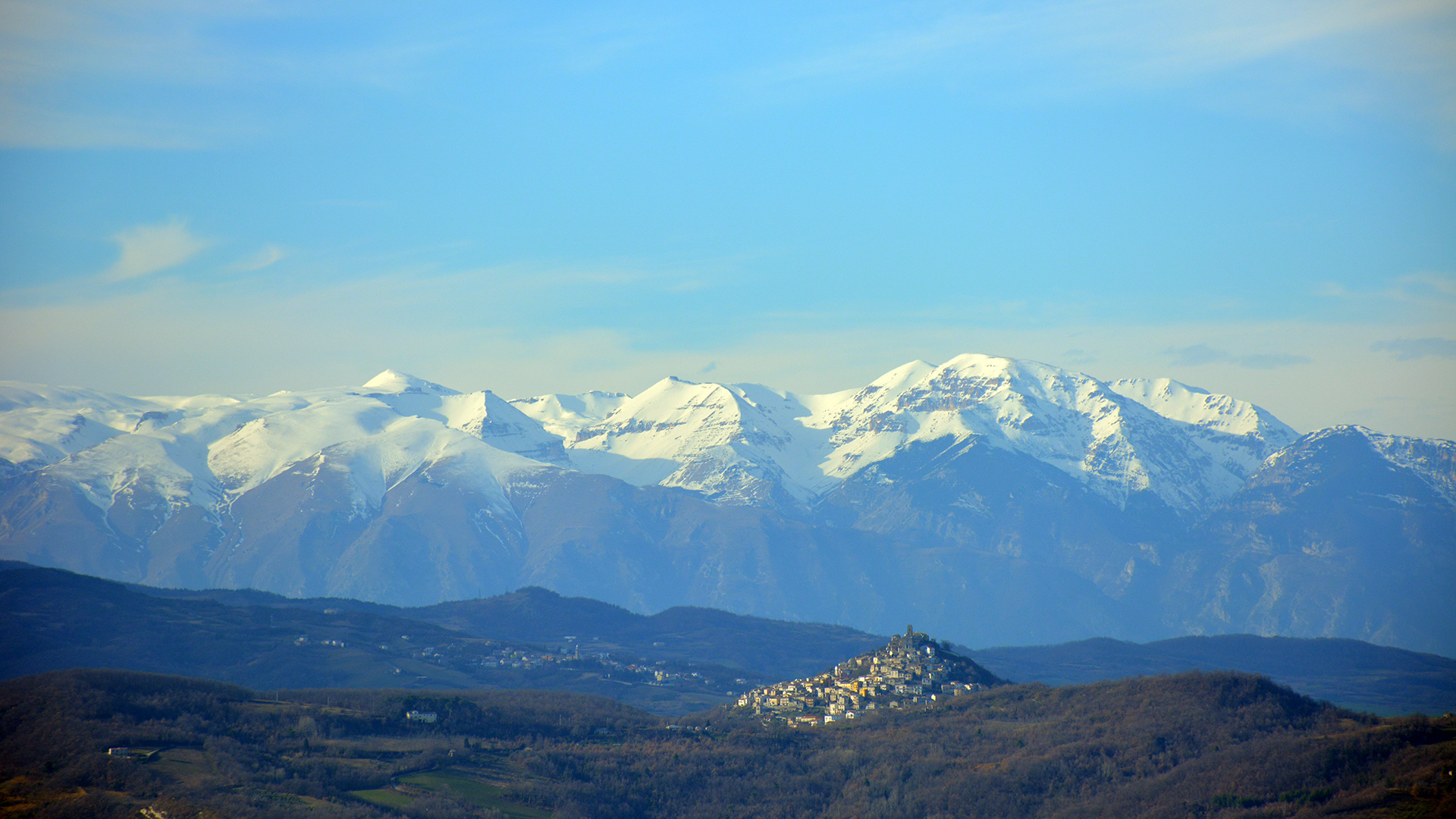 Massiccio della Majella visto da Montefalcone nel Sannio (CB) e in primo piano, Carunchio (CH)